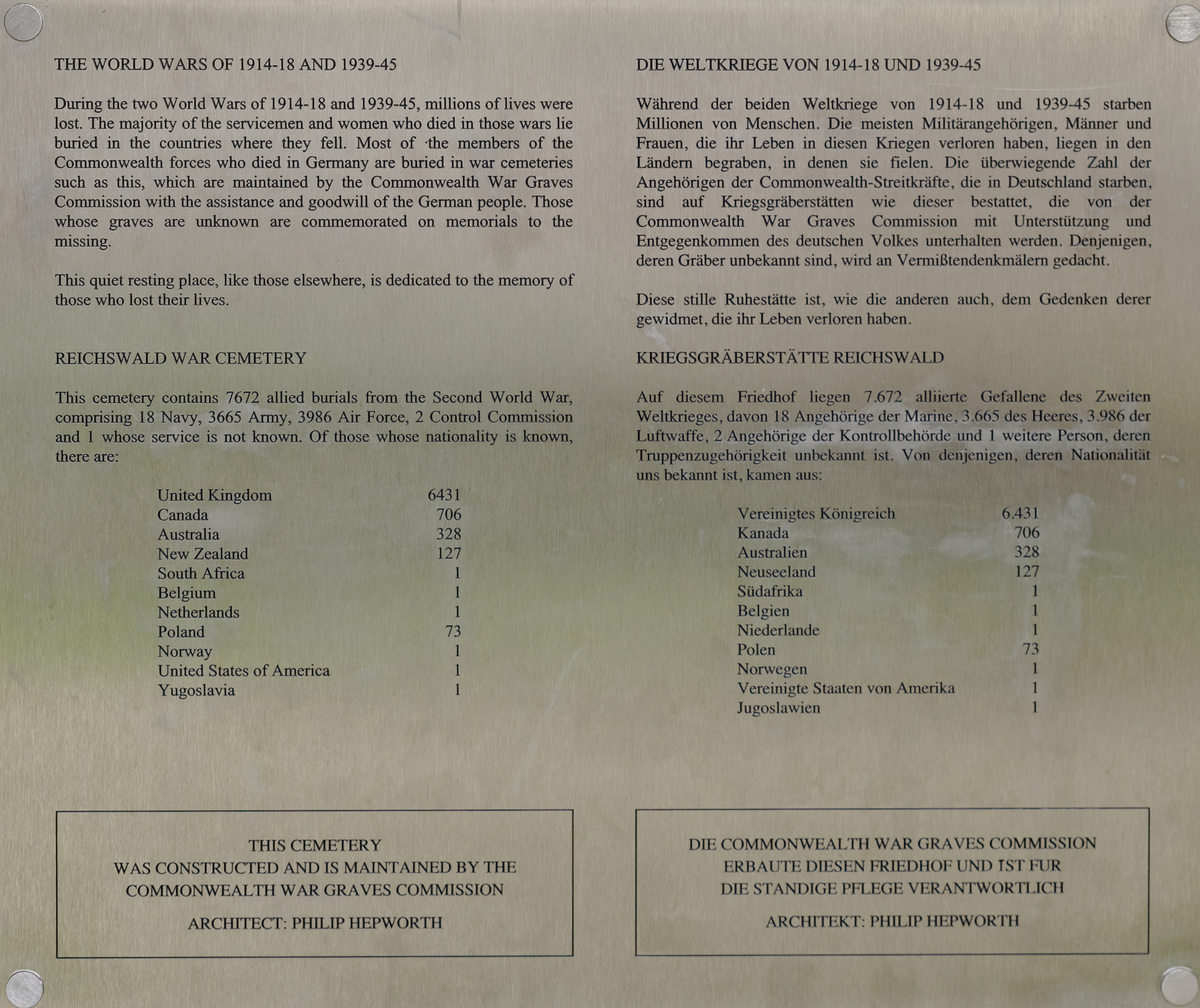 Gedenktafel mit dem Verzeichnis der gefallen Soldaten